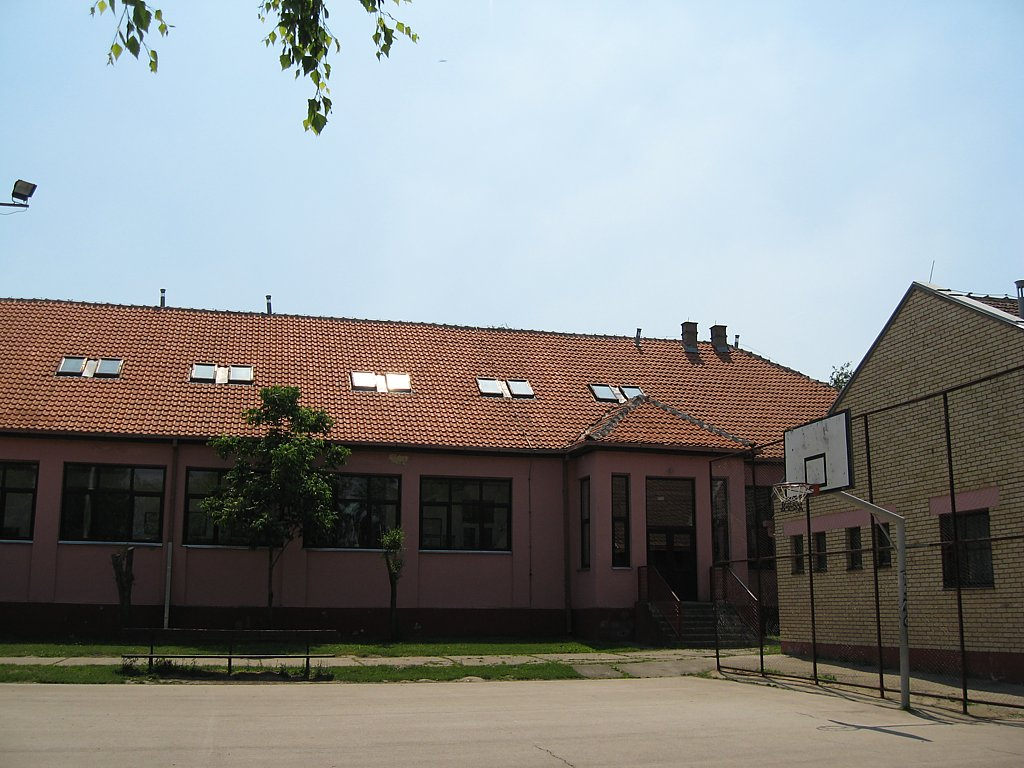 Osnovna škola Petar Kočić u Česteregu, autor Ljubiša Šujica